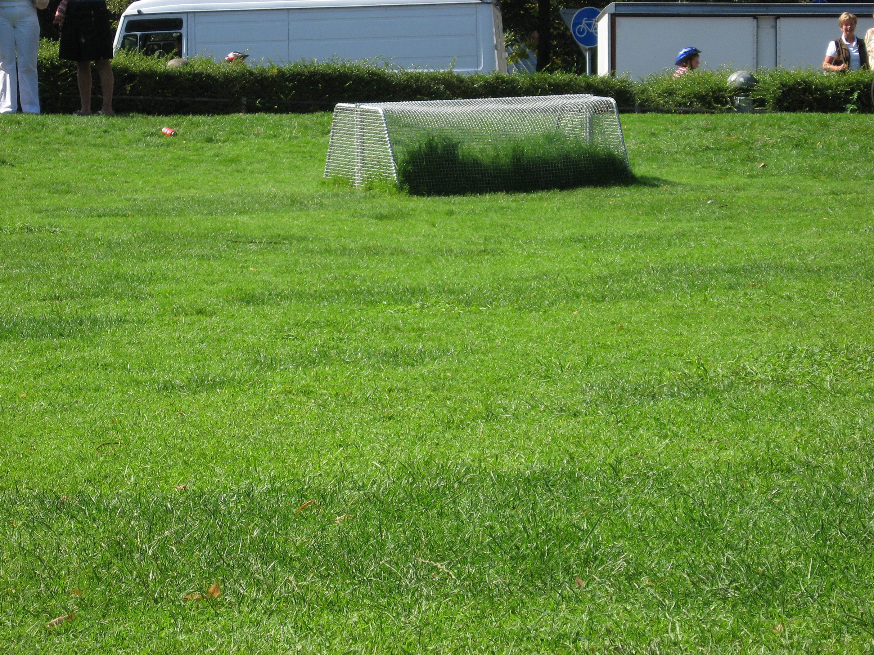 Skulptur.Projekte - Dominique Gonzalez-Foerster (2007). Foto scattata da Giulia Casula